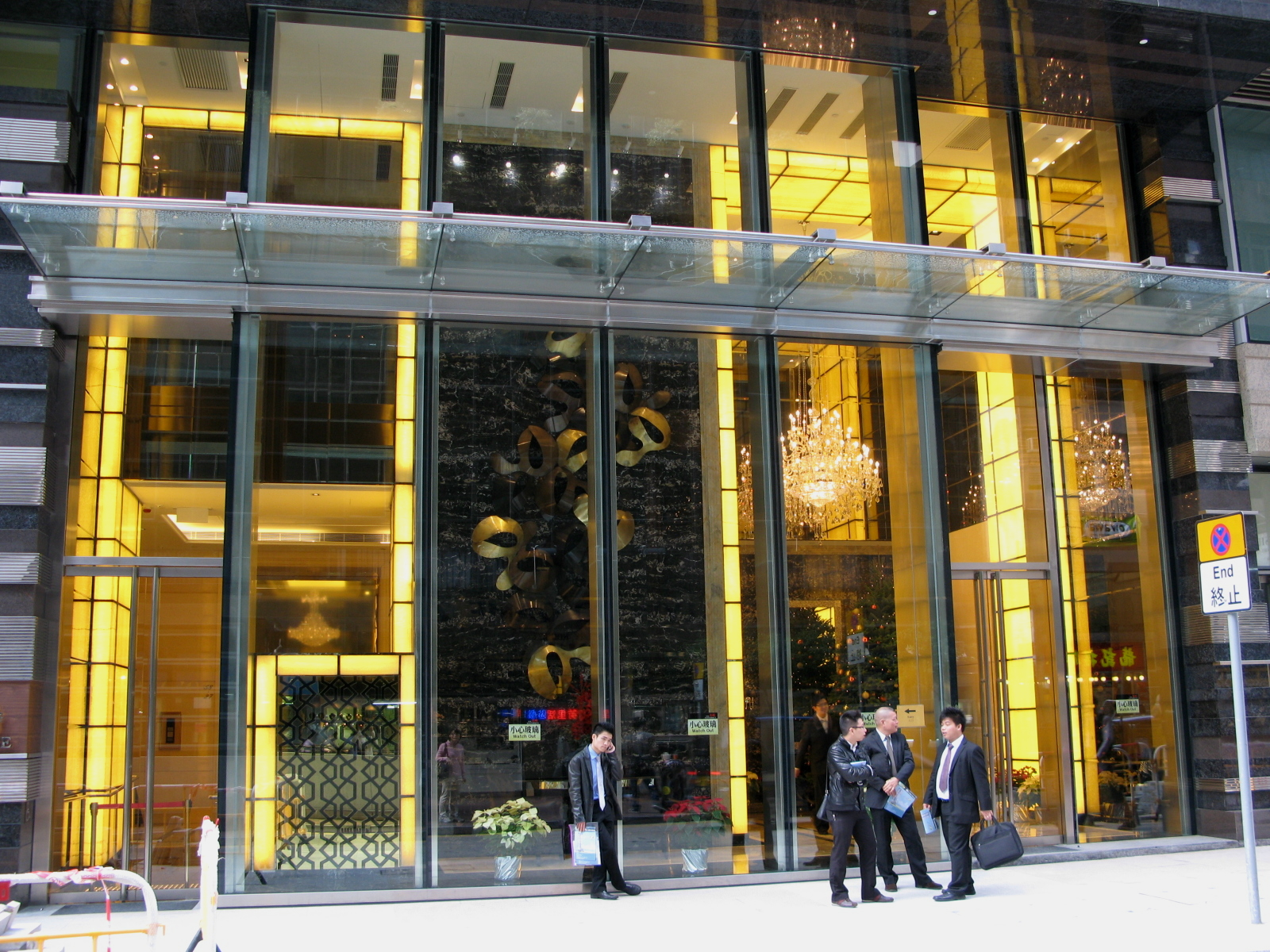 Masterpiece_Residetional Enterence